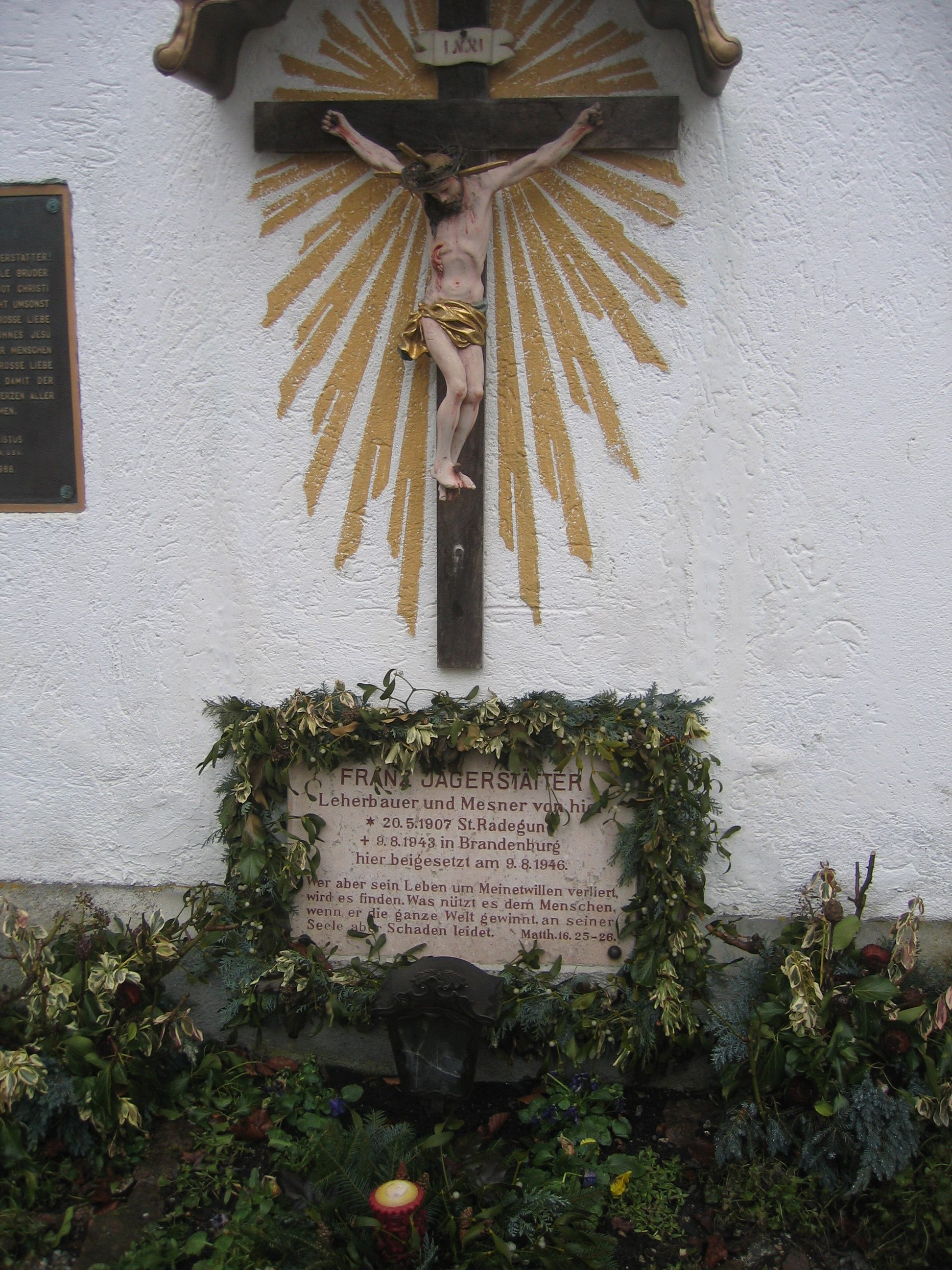 Grab Franz Jägerstätters in St. Radegund